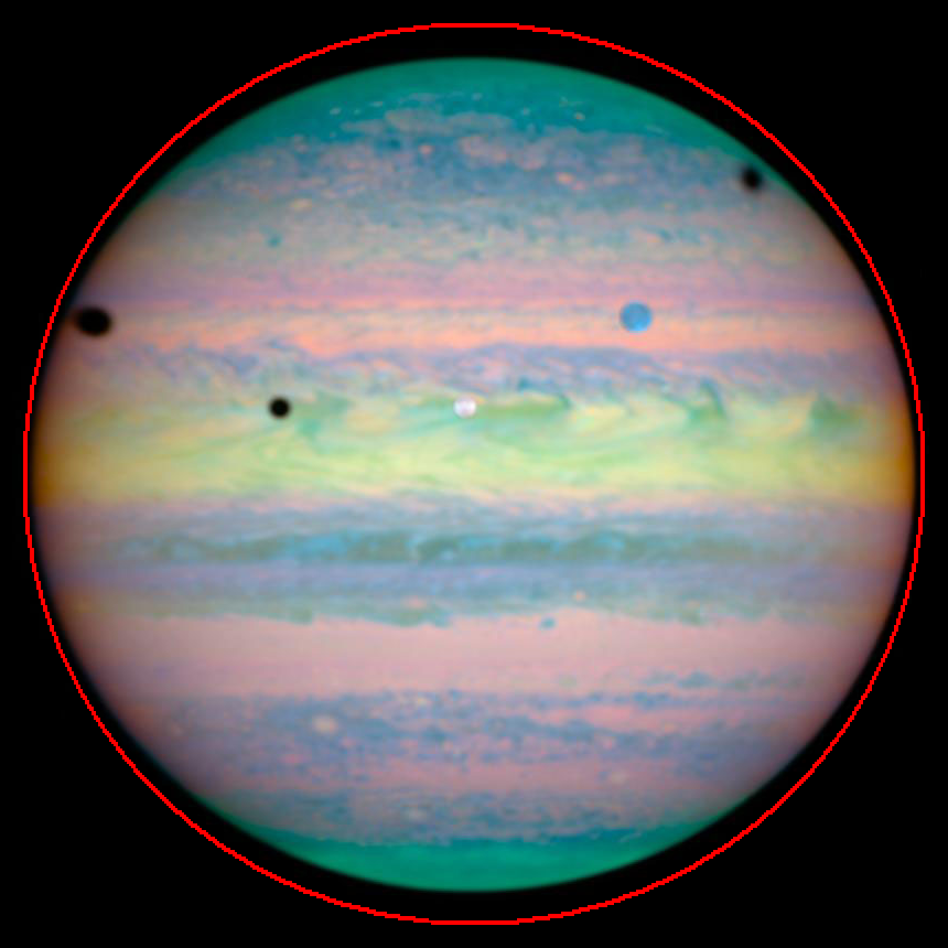 Abplattung des Jupiter im Vergleich zu einer Kugel (rot angedeutet)